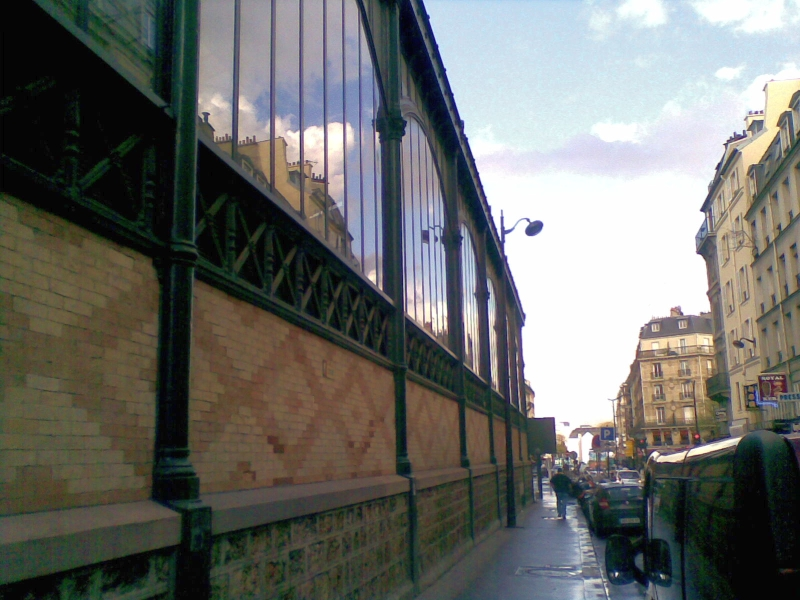 Rue de Chabrol et le marché Saint-Quentin (à gauche) - Paris 10e